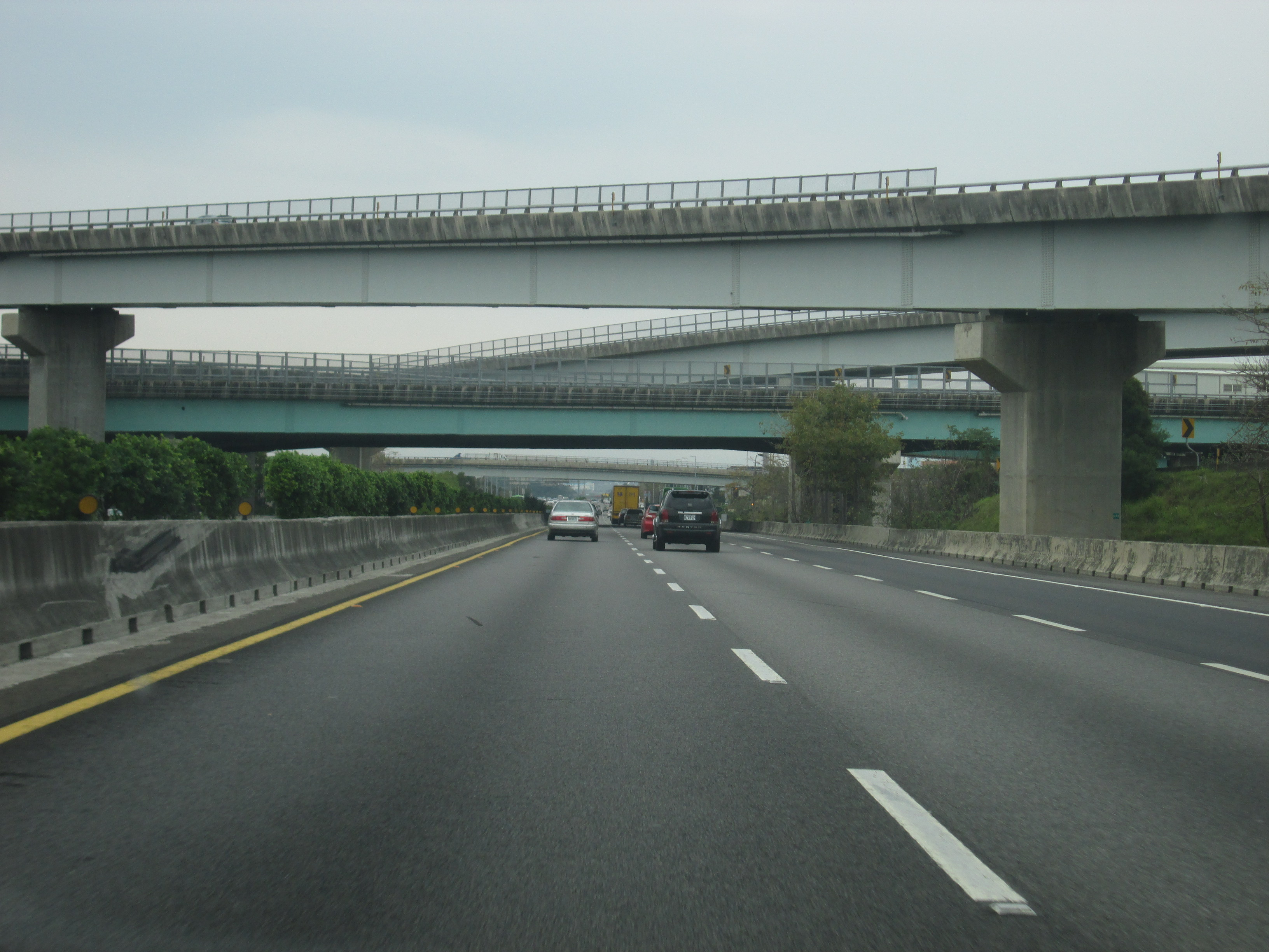 台中市神岡區 中山高速公路台中系統交流道